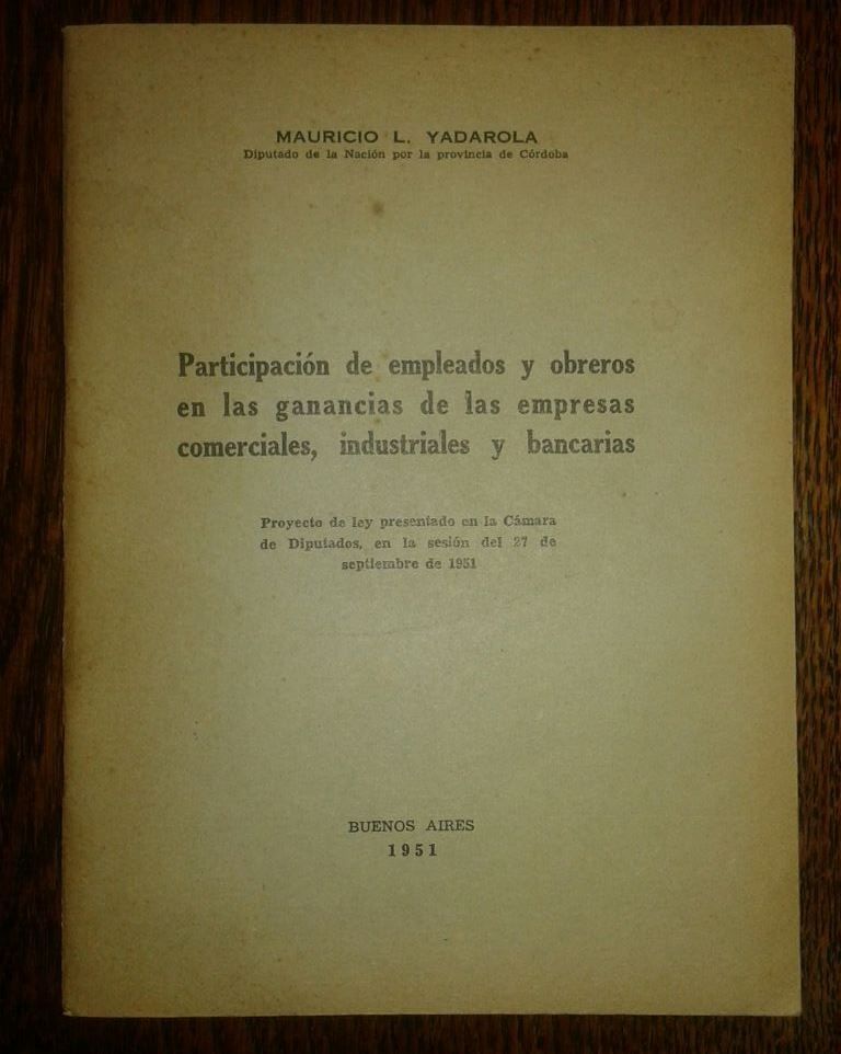 Proyecto de Ley del diputado nacional argentino Mauricio Yadarola sobre participación de empleados y obreros en las ganancias de las empresas (1951).